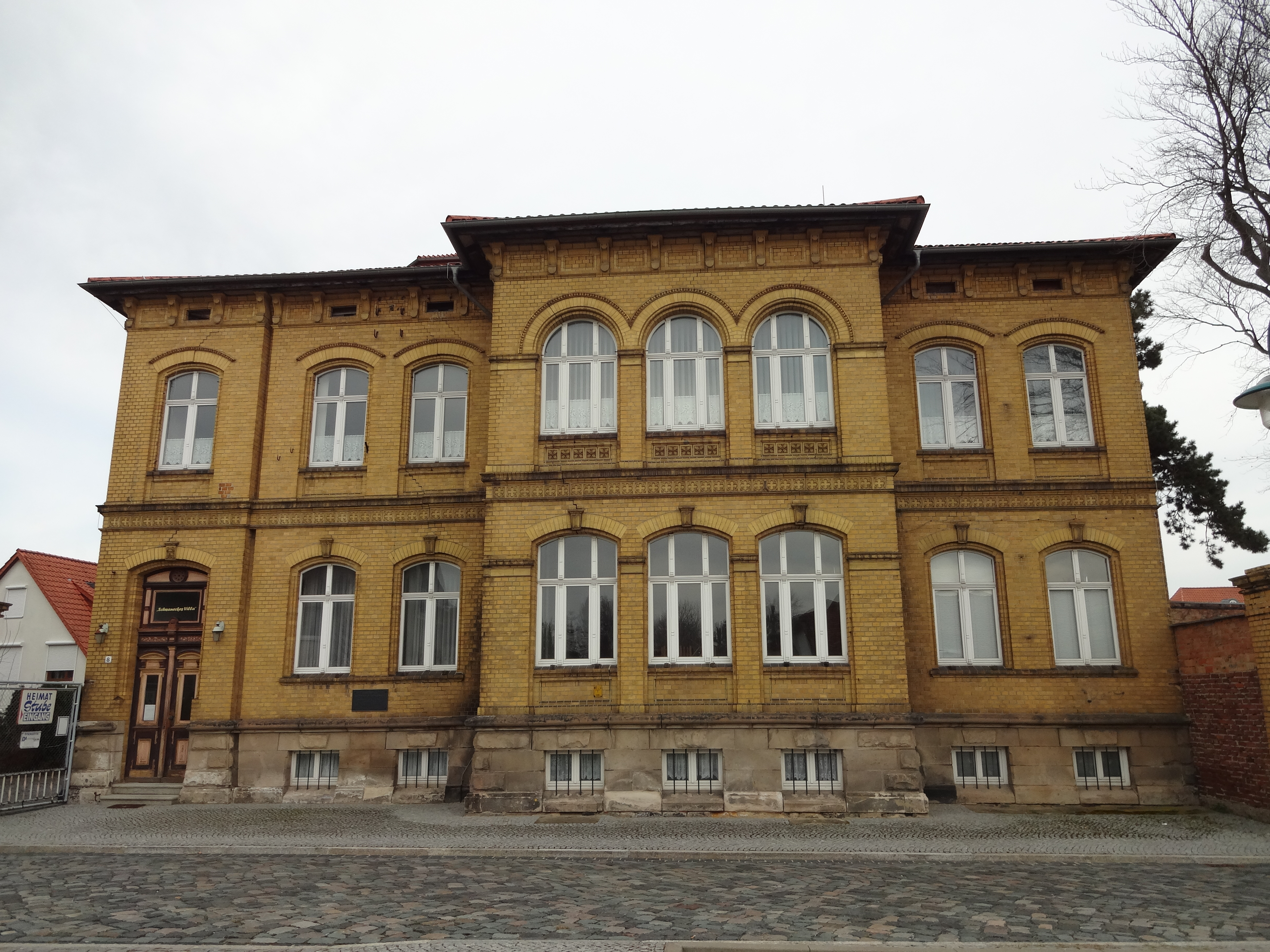 denkmalgeschützte Villa in der Obermauerstraße 8 in Derenburg, Ortsteil von Blankenburg (Harz)